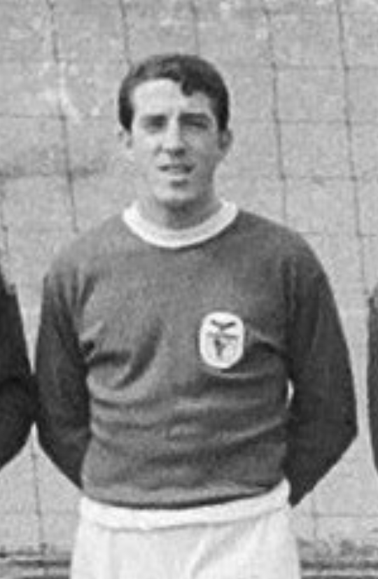 José Augusto con el Benfica en 1965